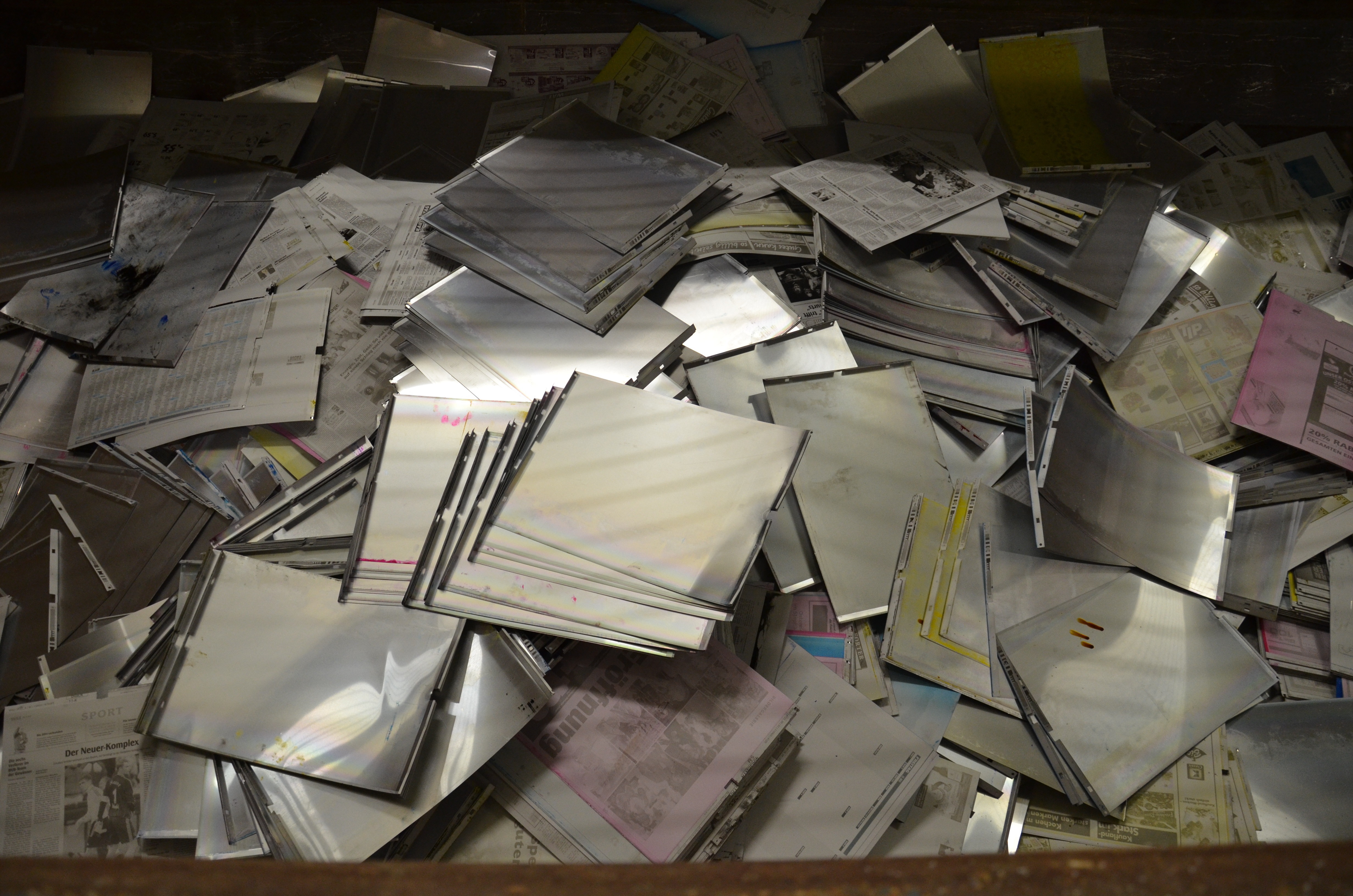 Druckhaus der WAZ Mediengruppe in Essen: Sammeln der verbrauchten Platten.